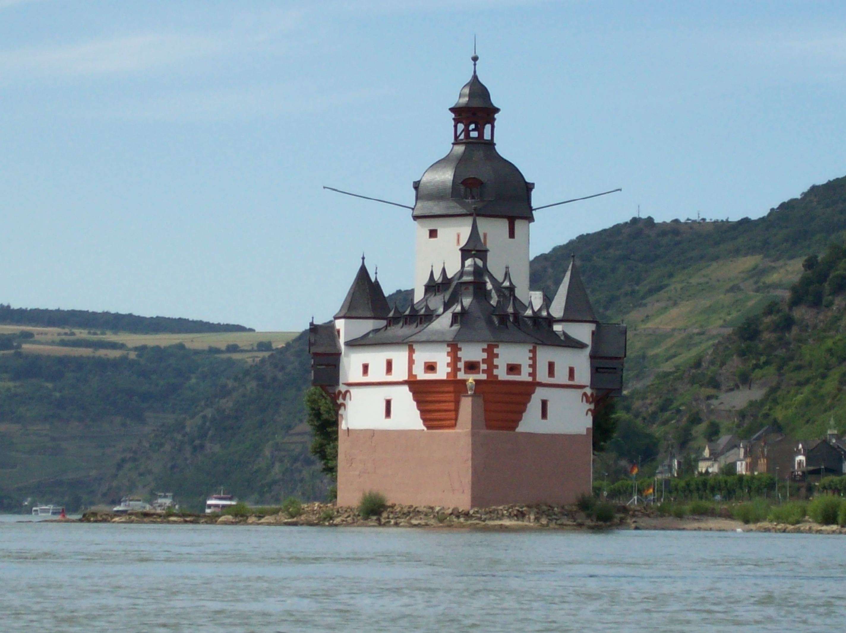 Südansicht vom Fluß aus